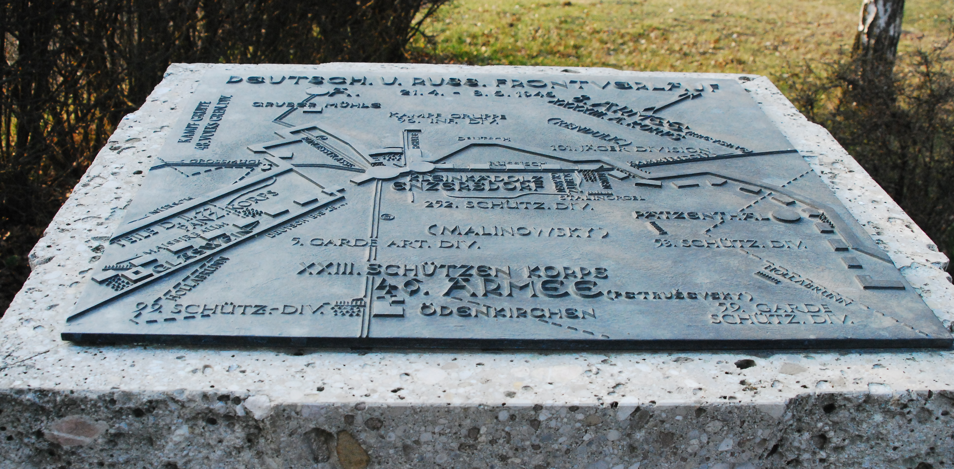 Denkmal in Kleinkadolz in Niederösterreich